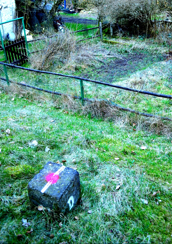 Die belgisch-deutsche Grenze teilt den Garten der zur belgischen Gemeinde Burg-Reuland gehörenden Einzelsiedlung Diepert in zwei Teile.